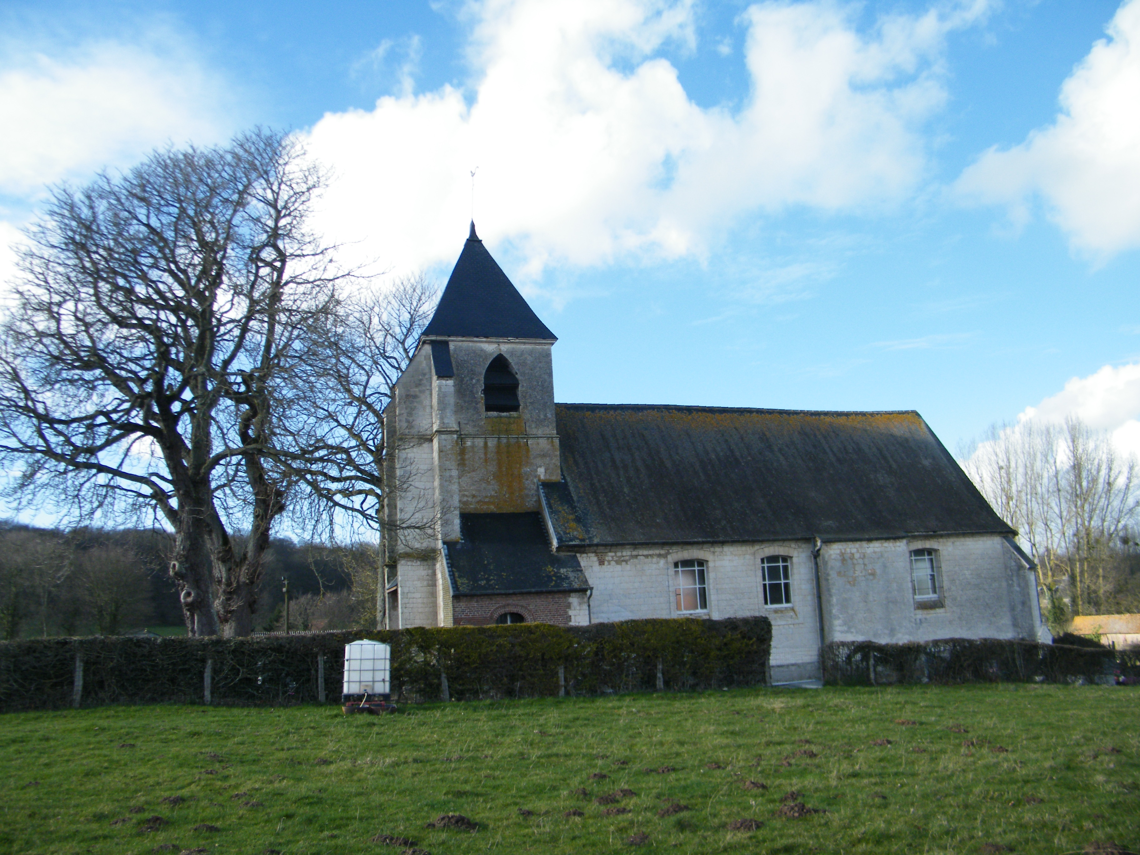 L'église2